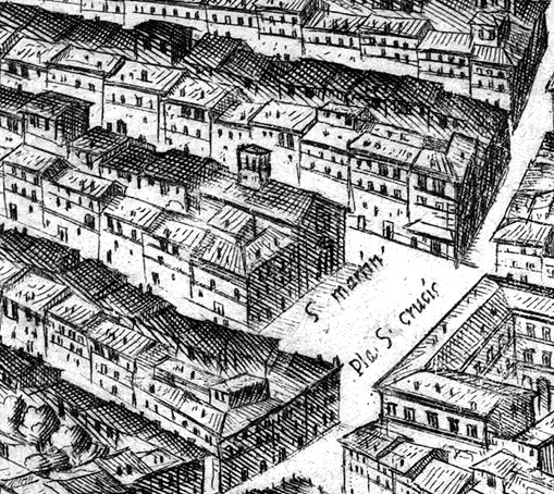 Pianta di Tempesta